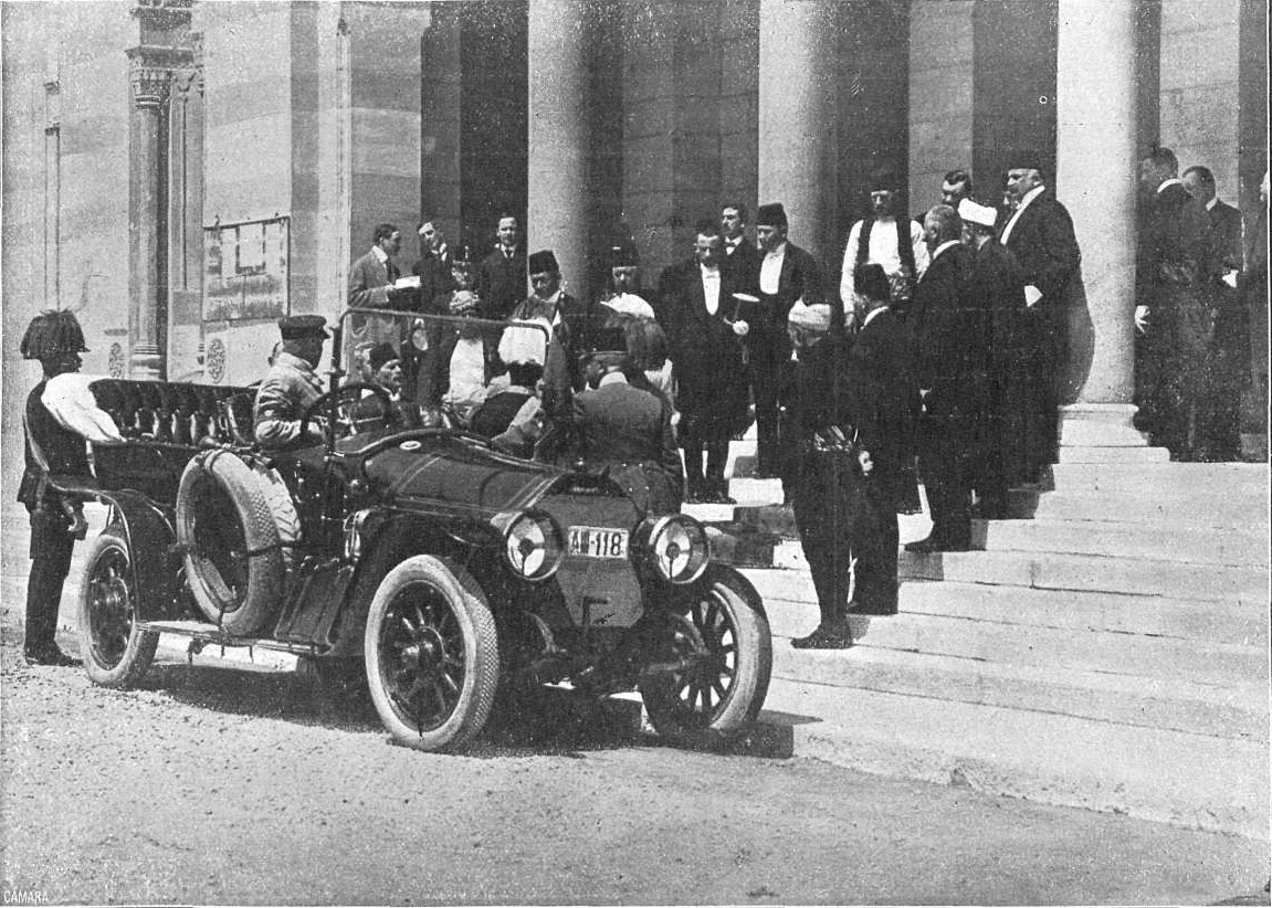 Descripción original: "Momento en que los archiduques de Austria, después del primer atentado de que fue(r)on víctimas, llegaron al Ayuntamiento, á cuyas puertas fueron recibidos por el alcalde y la corporación municipal"